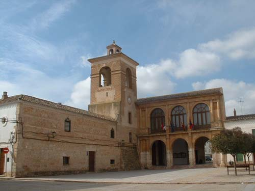 Ayuntamiento de Villanueva de la Jara (Cuenca).